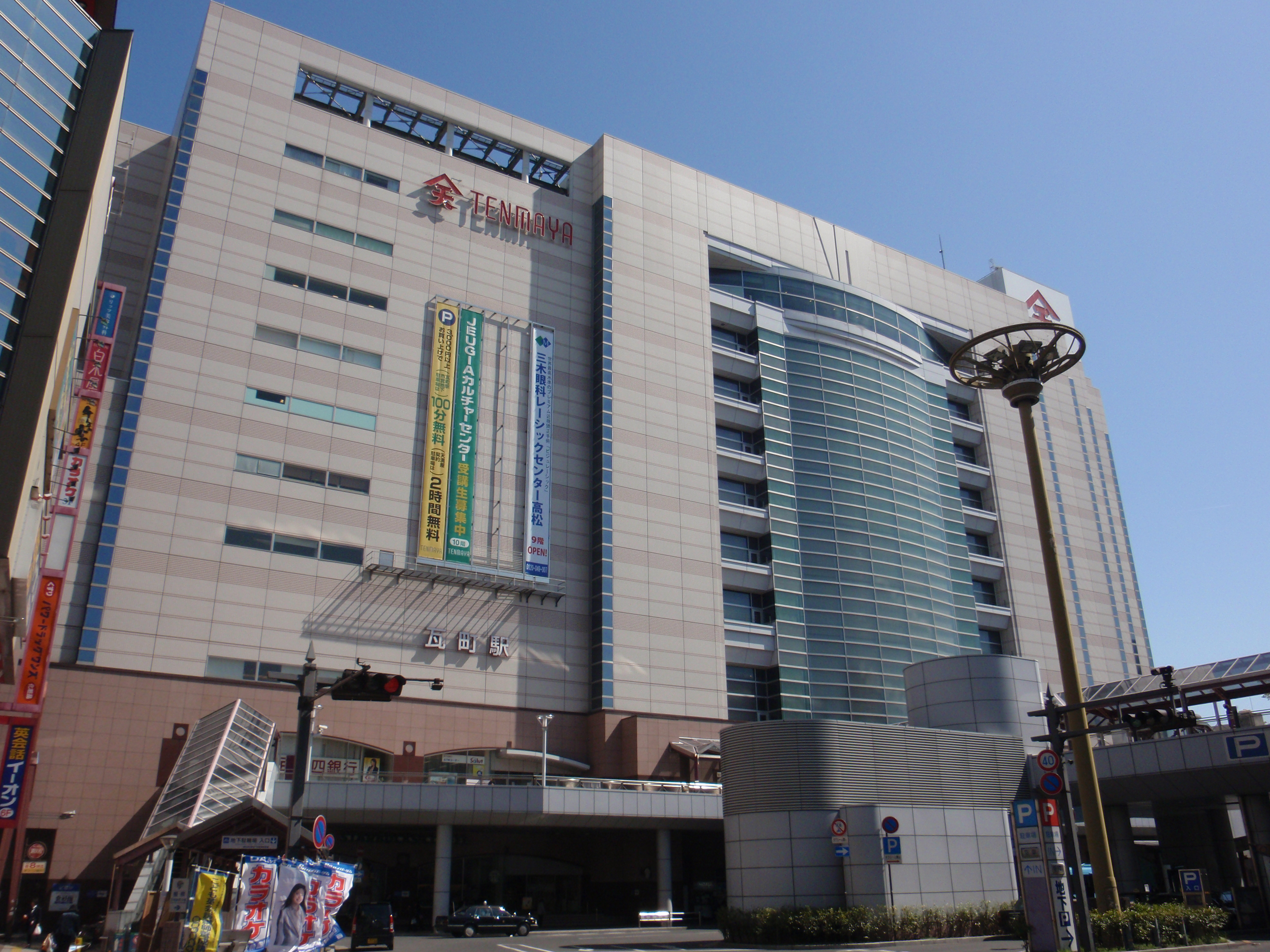 香川県高松市常磐町の琴電瓦町ビル。瓦町駅前広場から。ことでん瓦町駅のほか瓦町FLAG（撮影当時は高松天満屋）が入居している。